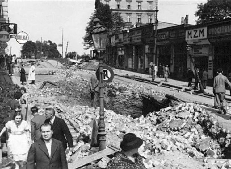 Bielsko-Biała. Skutki wysadzenia tunelu kolejowego pod ul. 3 Maja w dniu 3 września 1939.